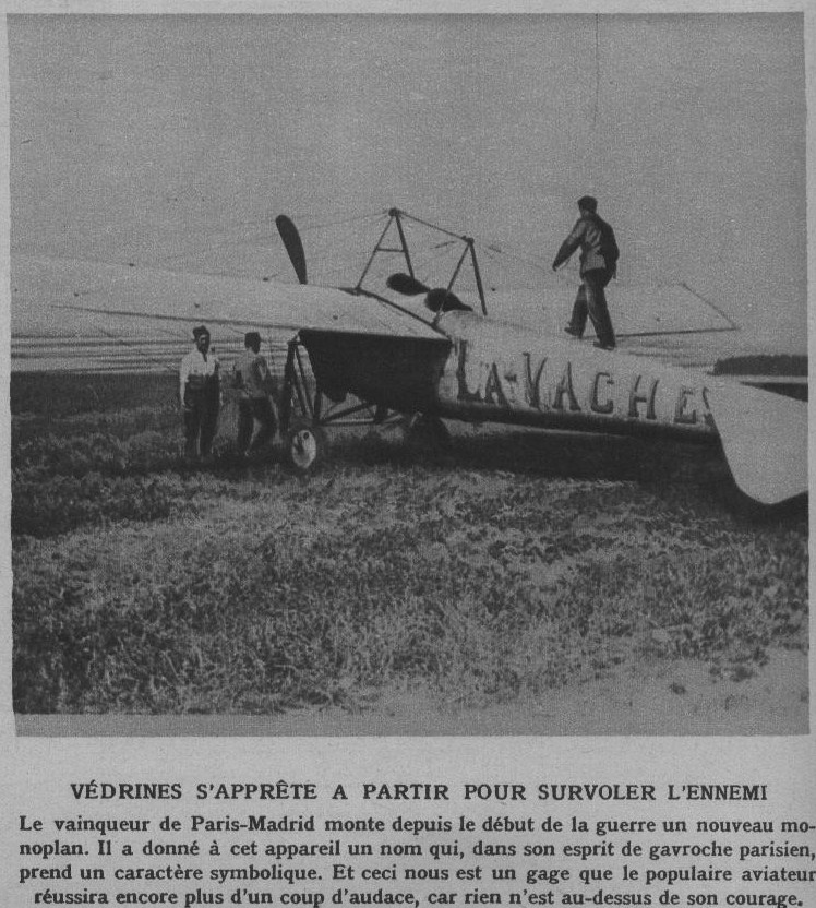 le pilote jules Védrines_et_son_avion un Blériot XXXVIbis.